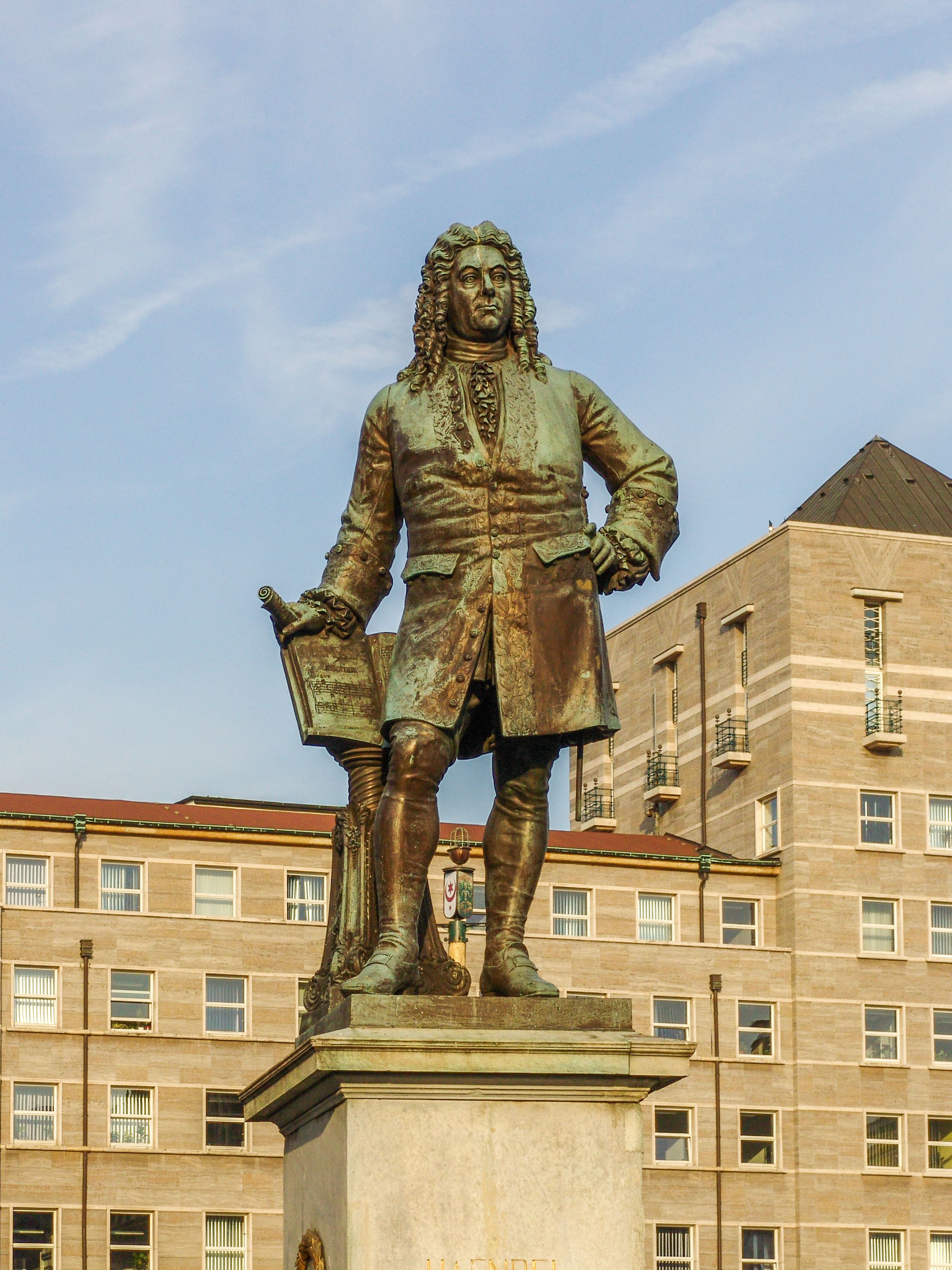 Händeldenkmal am Markt in Halle